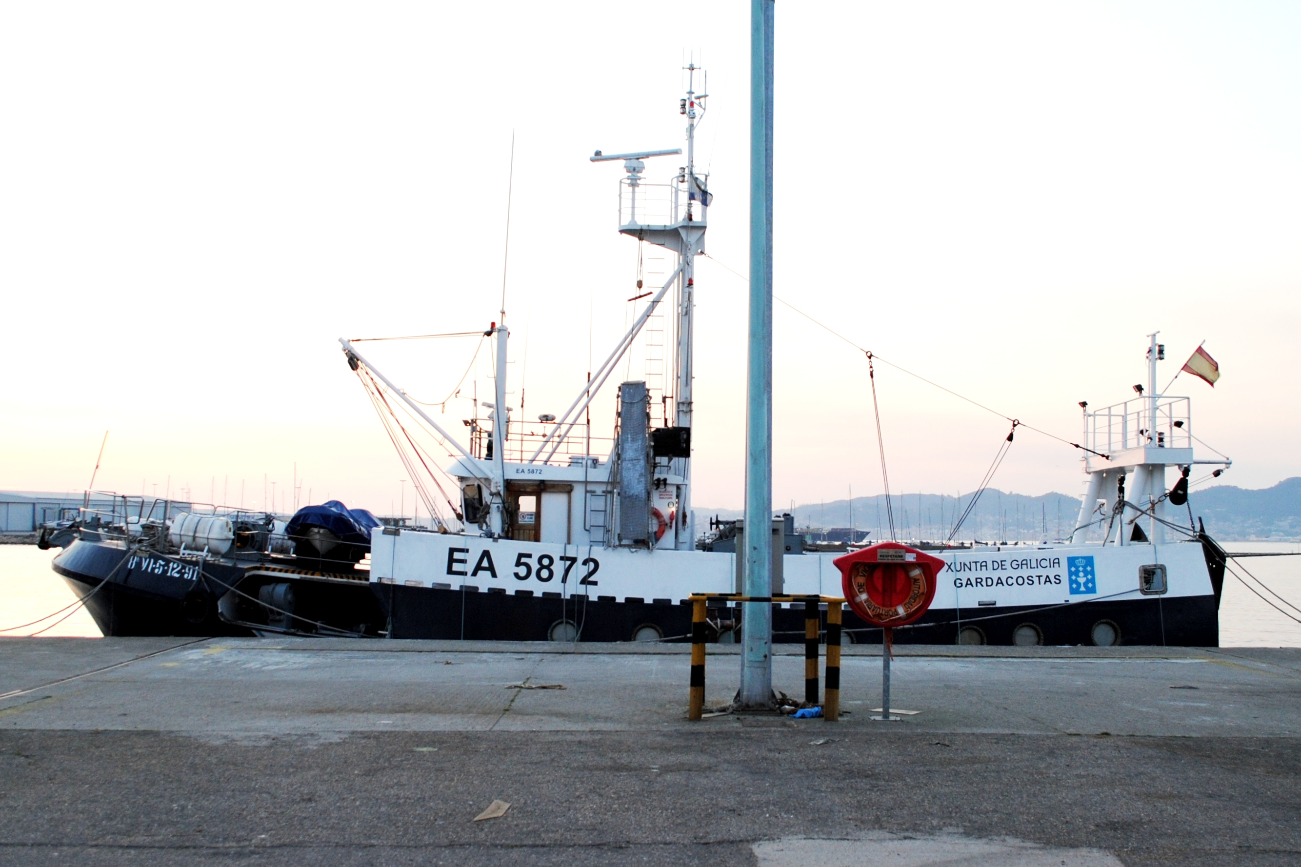 V. Paz Andrade, MMSI 224021540